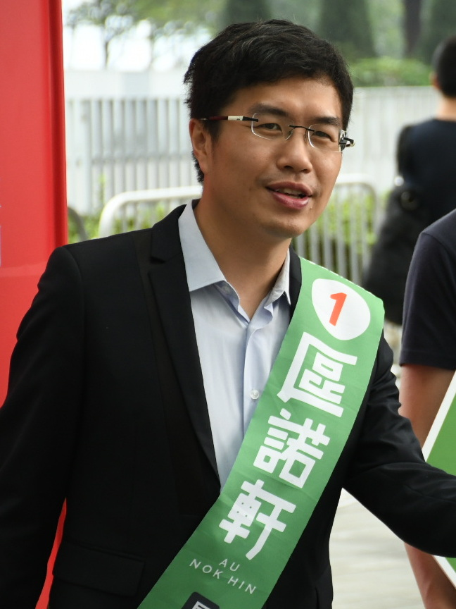 民主派立法會補選港島區候選人區諾軒